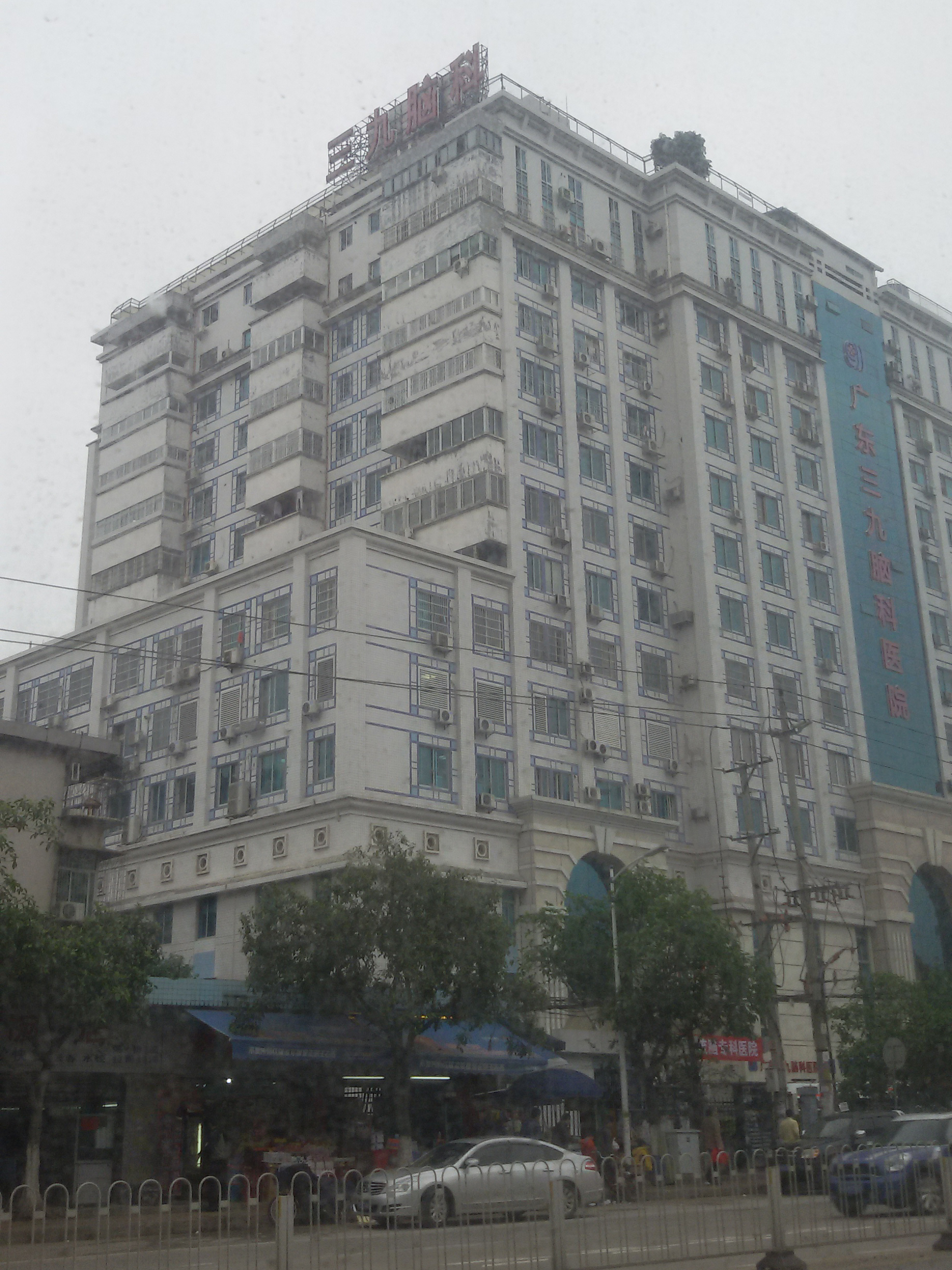 粵語: 廣東三九腦科醫院